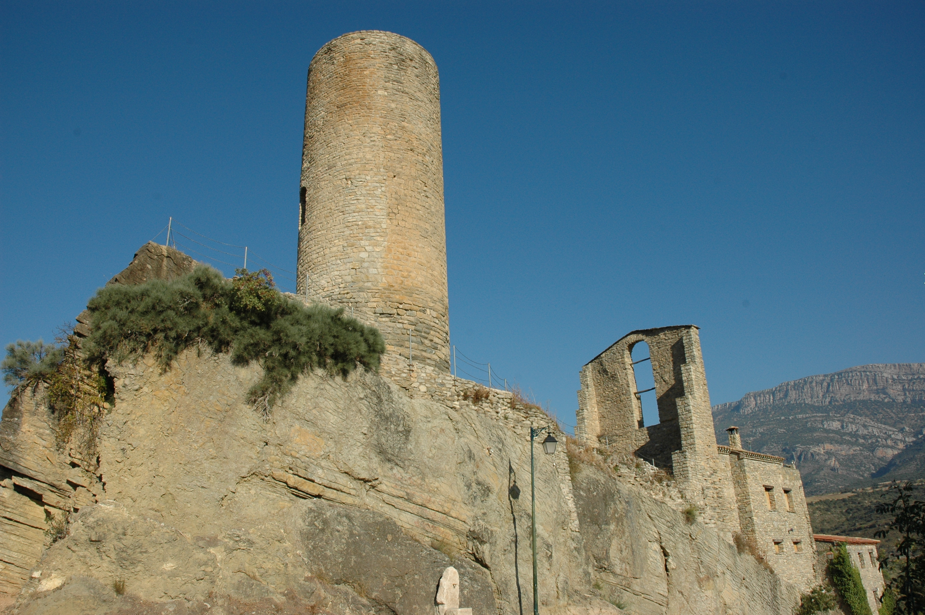 Castell de Sant Oïsme